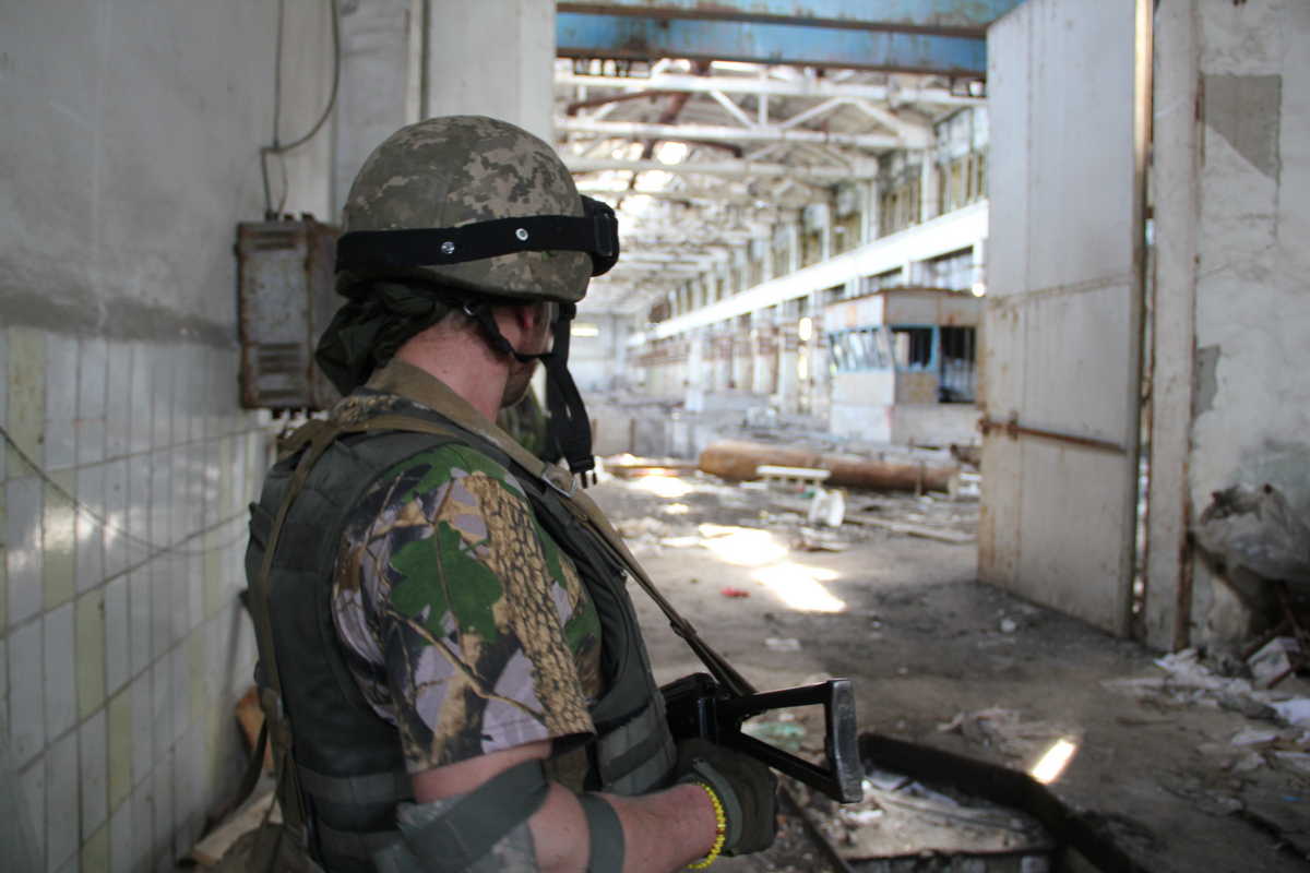 Авдеевка, промзона.